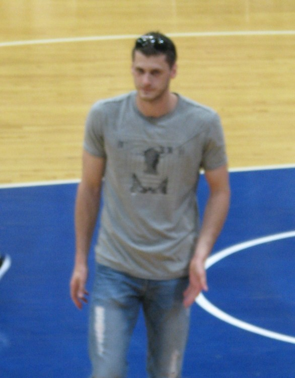 Marin Rozić